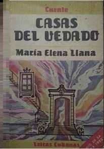 MaríaELL3